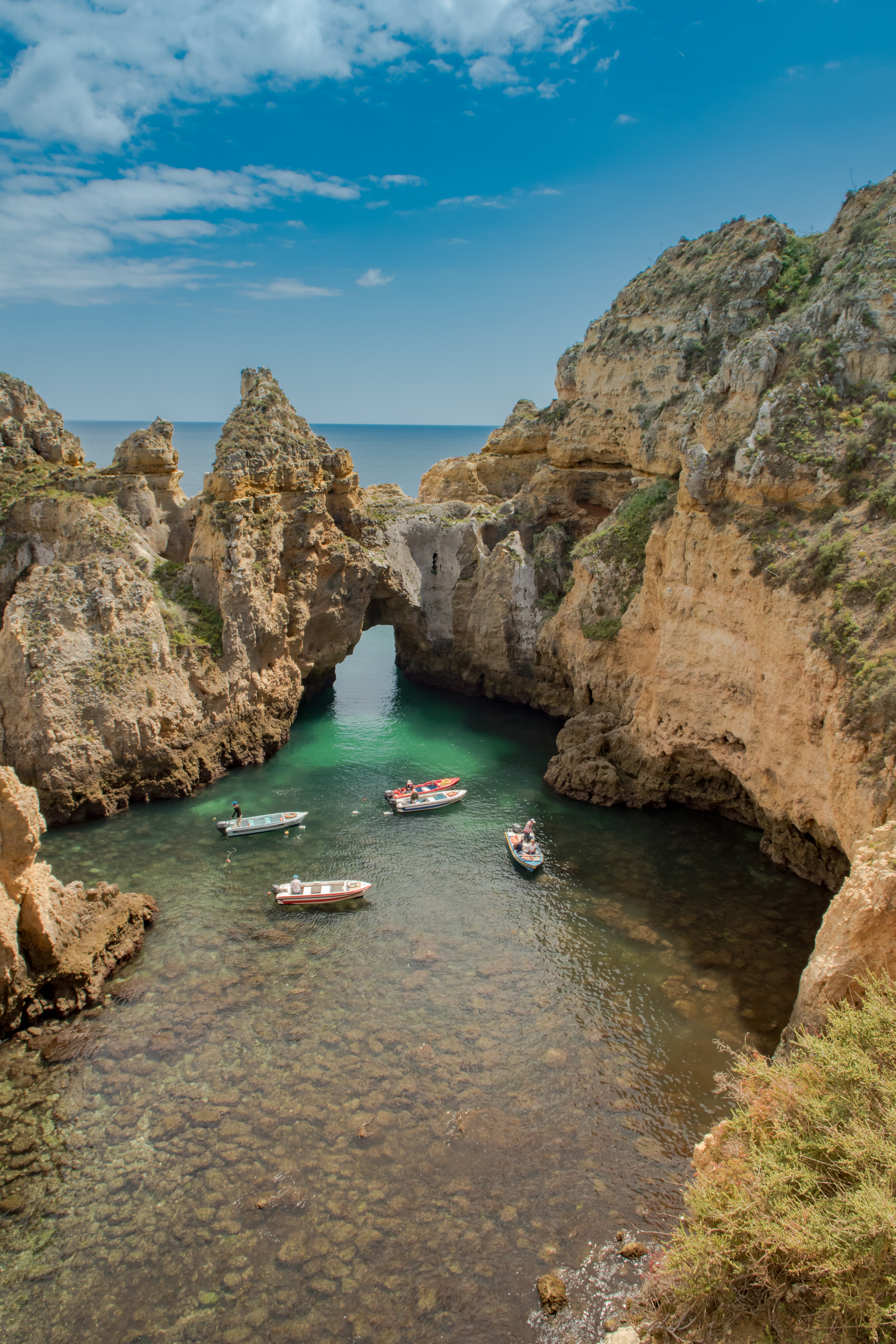 Die Ponta da Piedade ist die Spitze einer steilen Landzunge in der Nähe von Lagos (Portugal) am Stadtrand von Lagos an der Algarve.